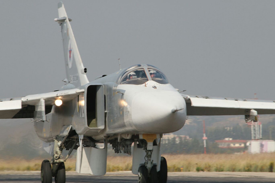 Боевые вылеты российской авиации с аэродрома «Хмеймим» для нанесения ударов по объектам террористов в Сирии